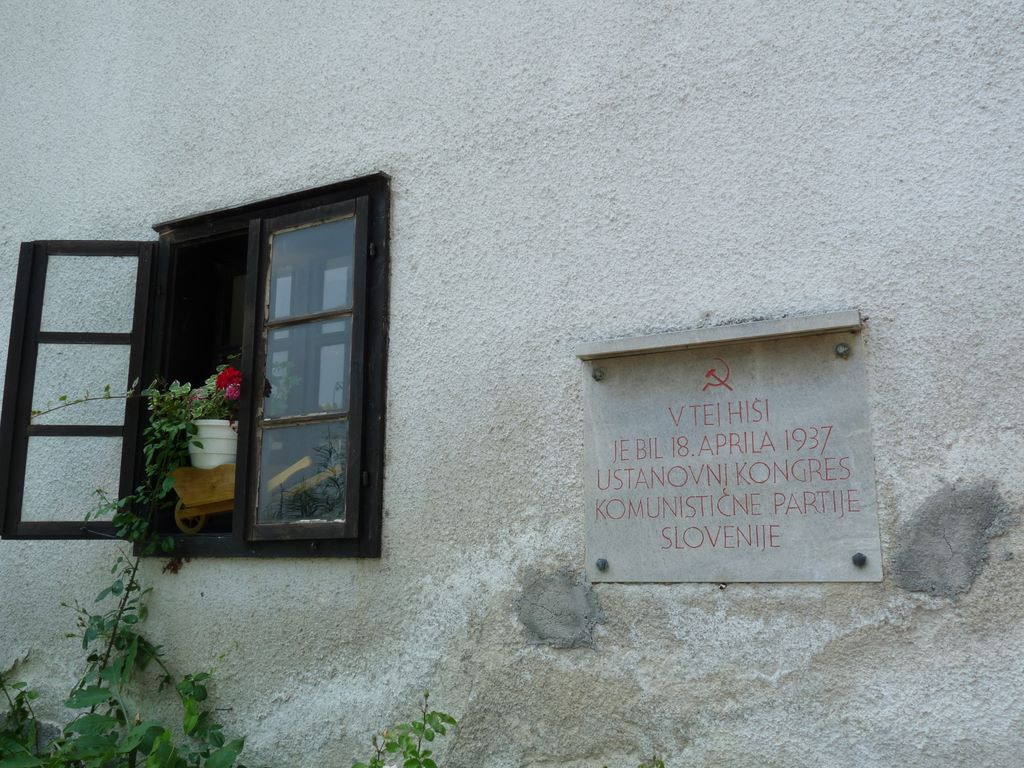 Čebine, spominska plošča ustanovnega kongresa KP Slovenije 1937